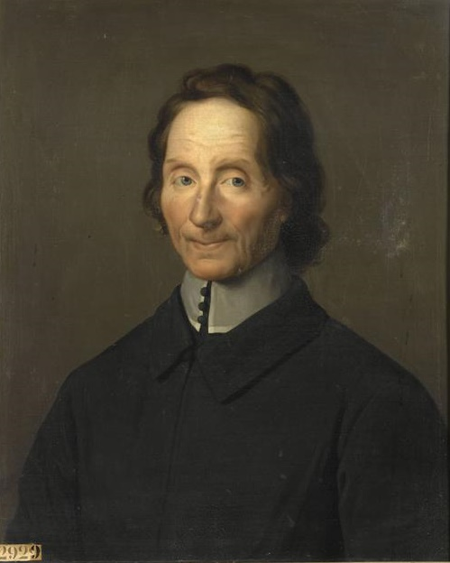 Nicolas Malebranche (1638-1715), filósofo y teólogo. Copia del original de Jean-Baptiste Santerre conservado en el colegio de los Oratorianos de Juilly.